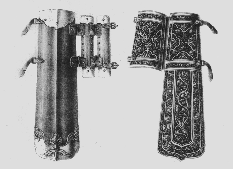 Русское вооружение с XIV до второй половины XVII столетия. Наручи.